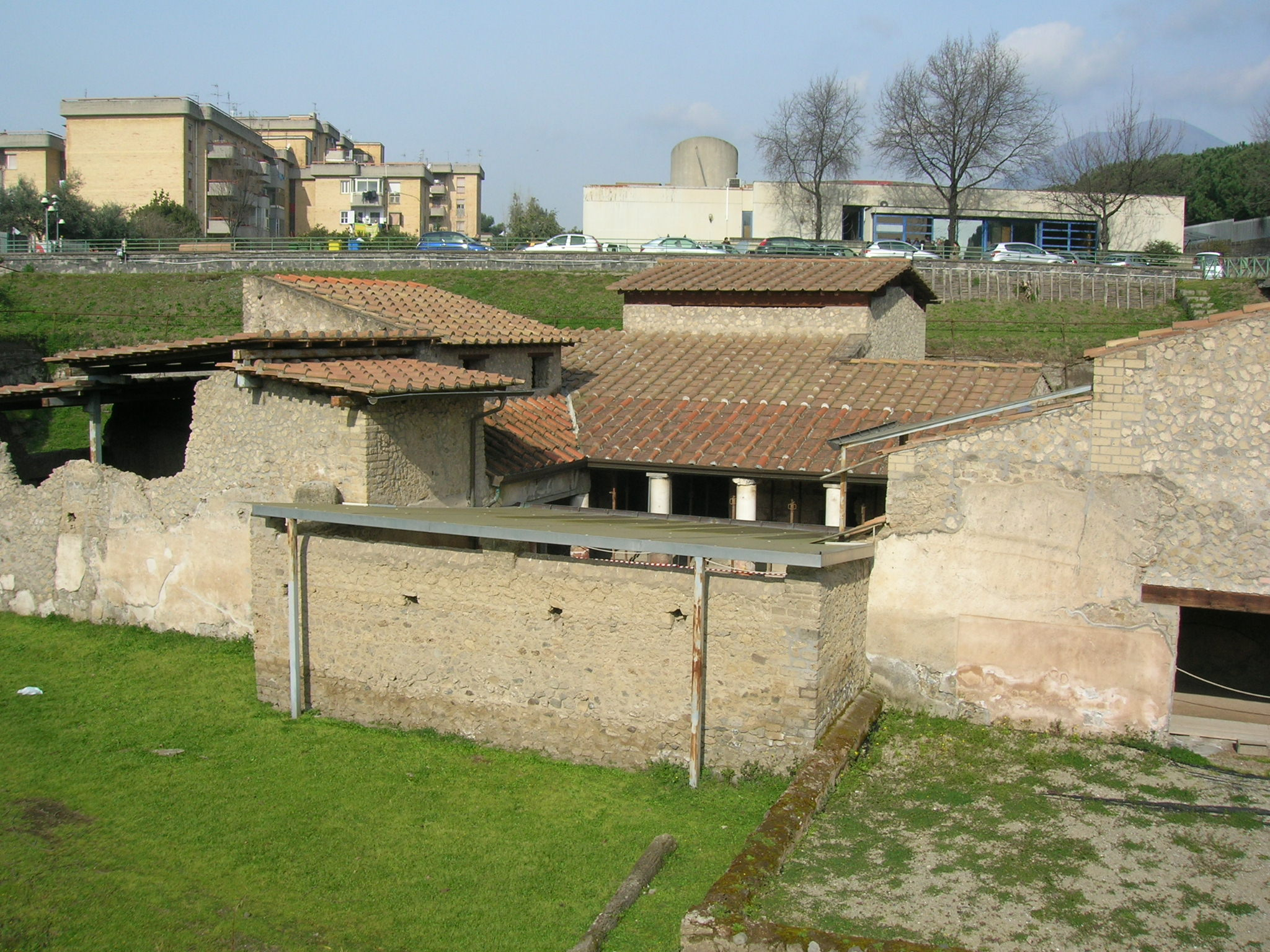 Veduta dall'alto